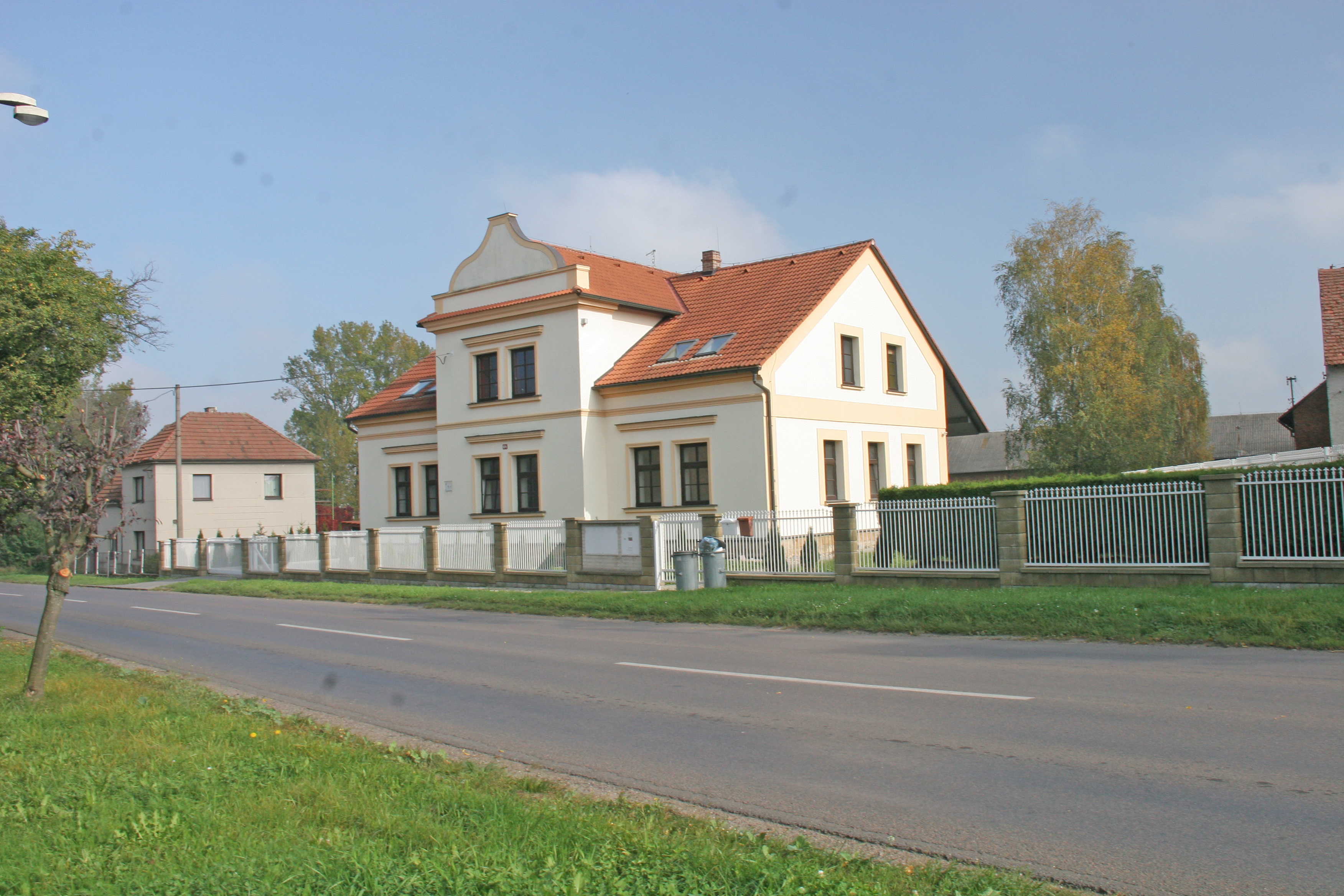 Zábědov 64